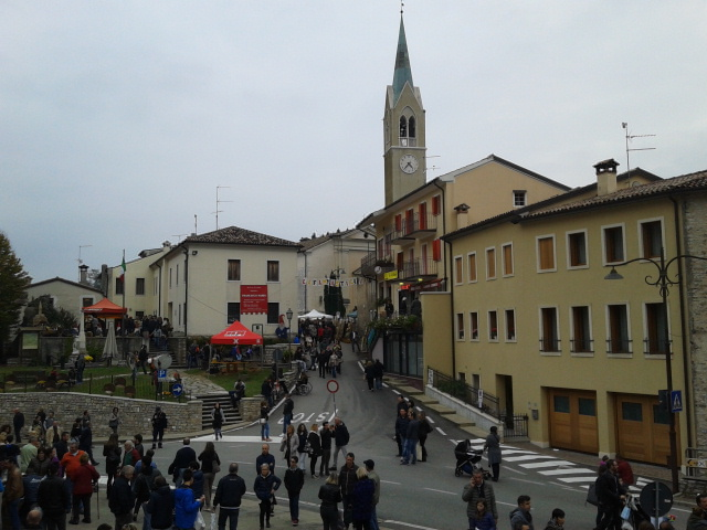 Il centro di Combai durante la Festa dei Marroni 2015